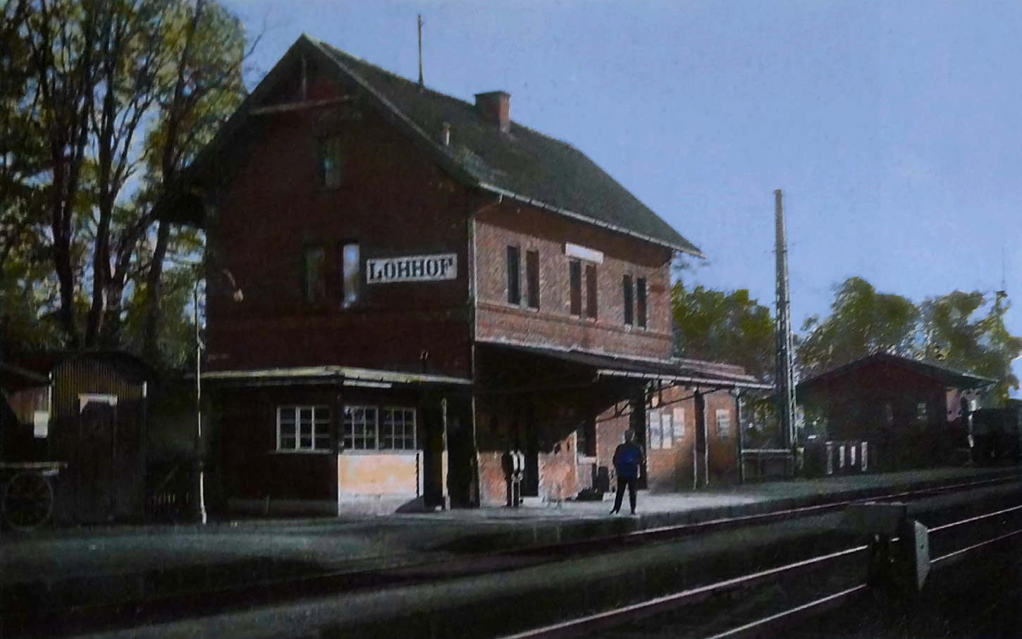 Postkartenfoto vom 1858 erbauten Bahnhof Lohhof nach der Elektrifizierung 1925. Foto um 1930. (Moderne Colorierung von 2018)